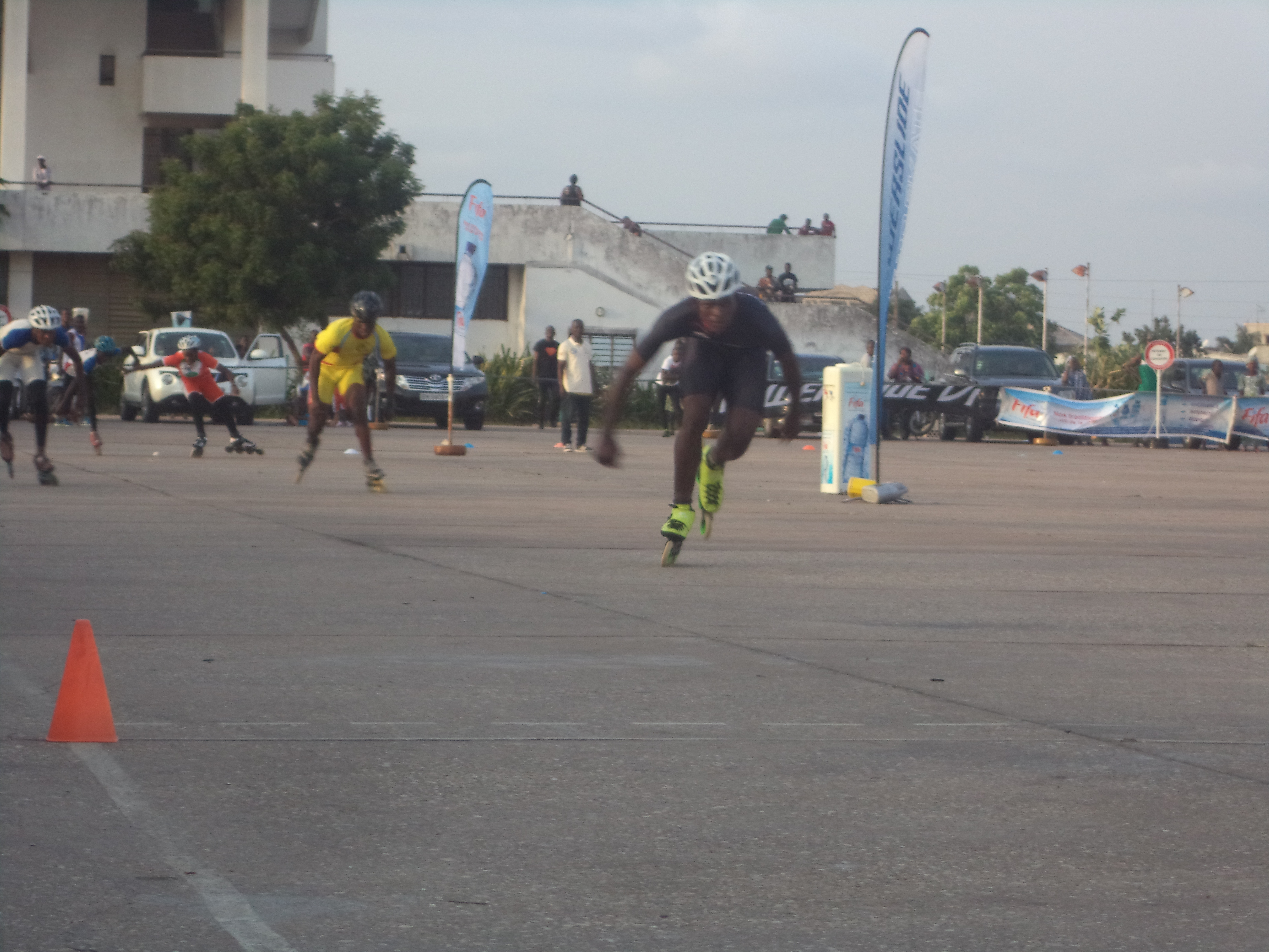 Compétition de rooler sport au stade Général Mathieu KEREKOU